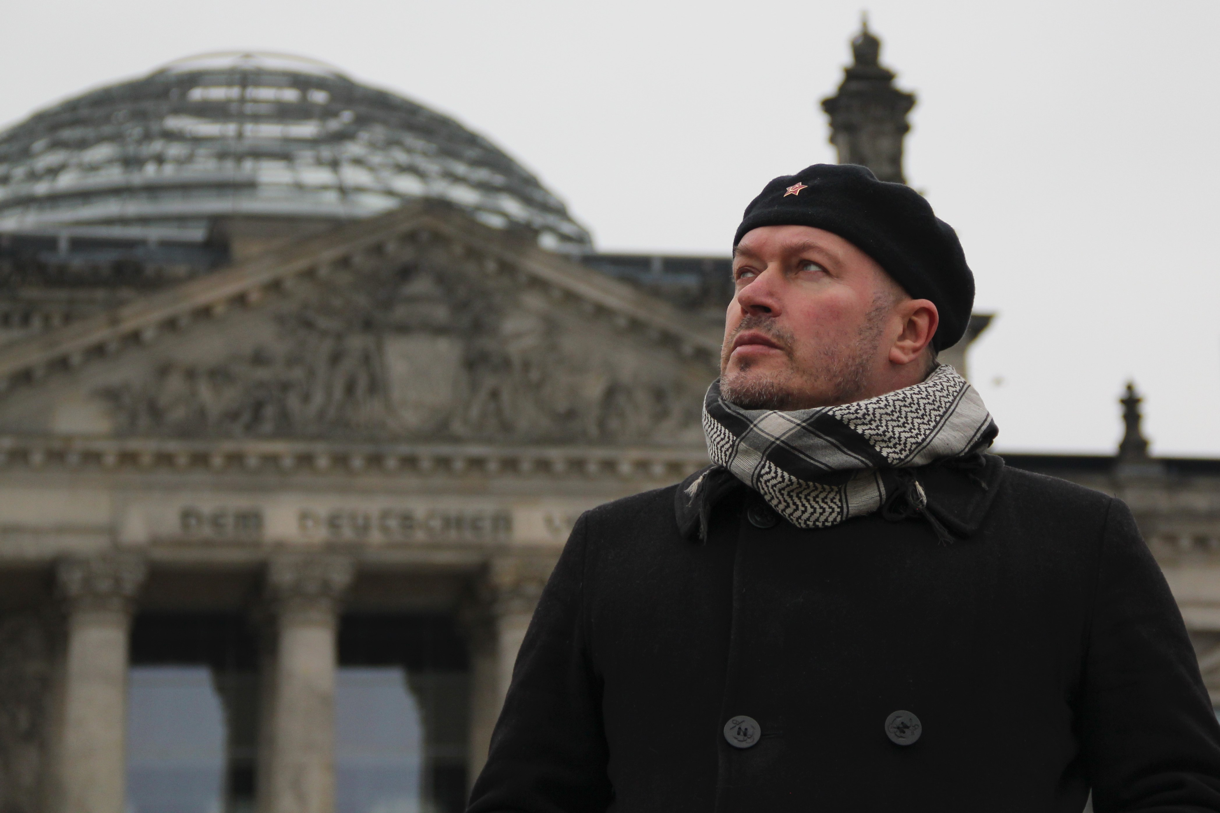 Композитор Игорь Дункул